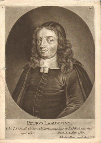 Peter Lambeck, österreichischer Hofbibliothekar, Wien